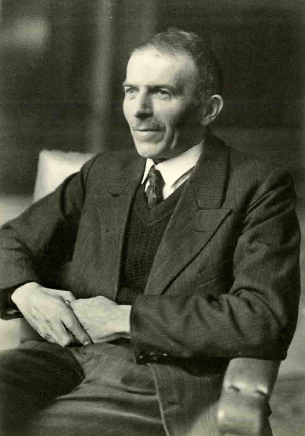 Das Bild stammt aus den Memoiren "Erinnerungen an mein Leben" von Karl Ströle. Diese wurden zu seinem 80. Geburtstag an seine Kinder und Enkel weitergegeben.